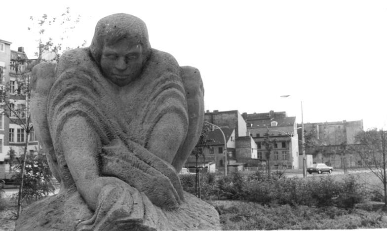 Für Bezieher des ADN-Reportagedienstes! Zum Beitrag: Mutter Lustig sitzt nun am Frauentoch-Ein Streifzug duch Alt-Köpenick. ADN-ZB-Sturm-18. 8. 1982-ha. Die Häuser der Köpenicker Altstadt im Rücken, dem Wasser des Frauentochs zugewandt - wäscht hier " Mutter Lustig" als Brunnenfigur. Henriette Lustig hatte die erste Lohnwäscherei im Berliner Stadtbezirk Köpenick begründet und damit bis zur Jahrhundertwende eine Entwicklung eingeleitet, die diesen Stadtbezirk förmlich zur " Waschküche" werden ließ. (Hierzu gehören auch 1982-0818-301+303-305N)"